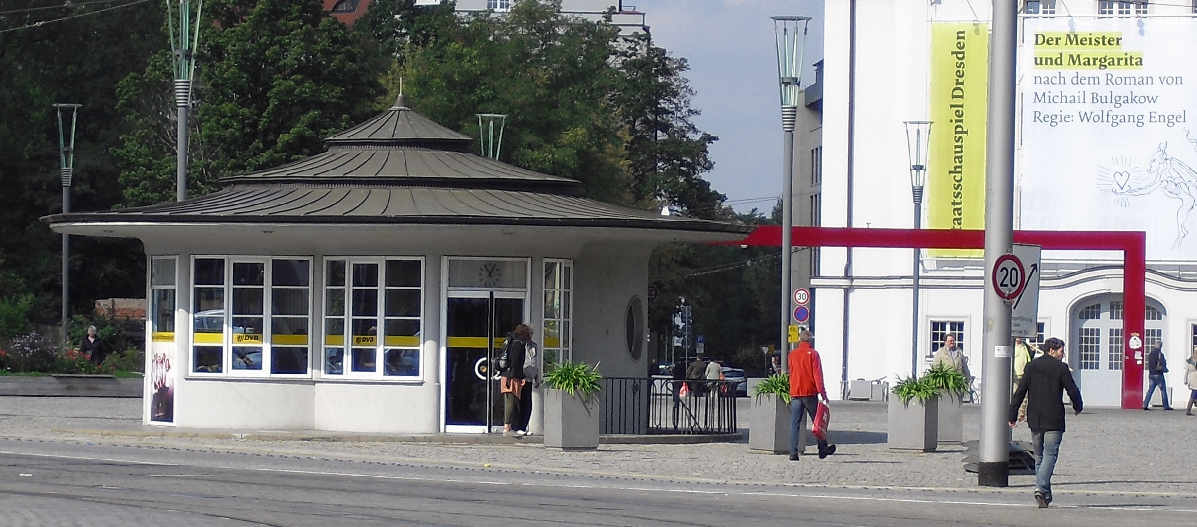 ehemaliger Haltestellenpavillon am Postplatz in Dresden, jetzt Service-Center